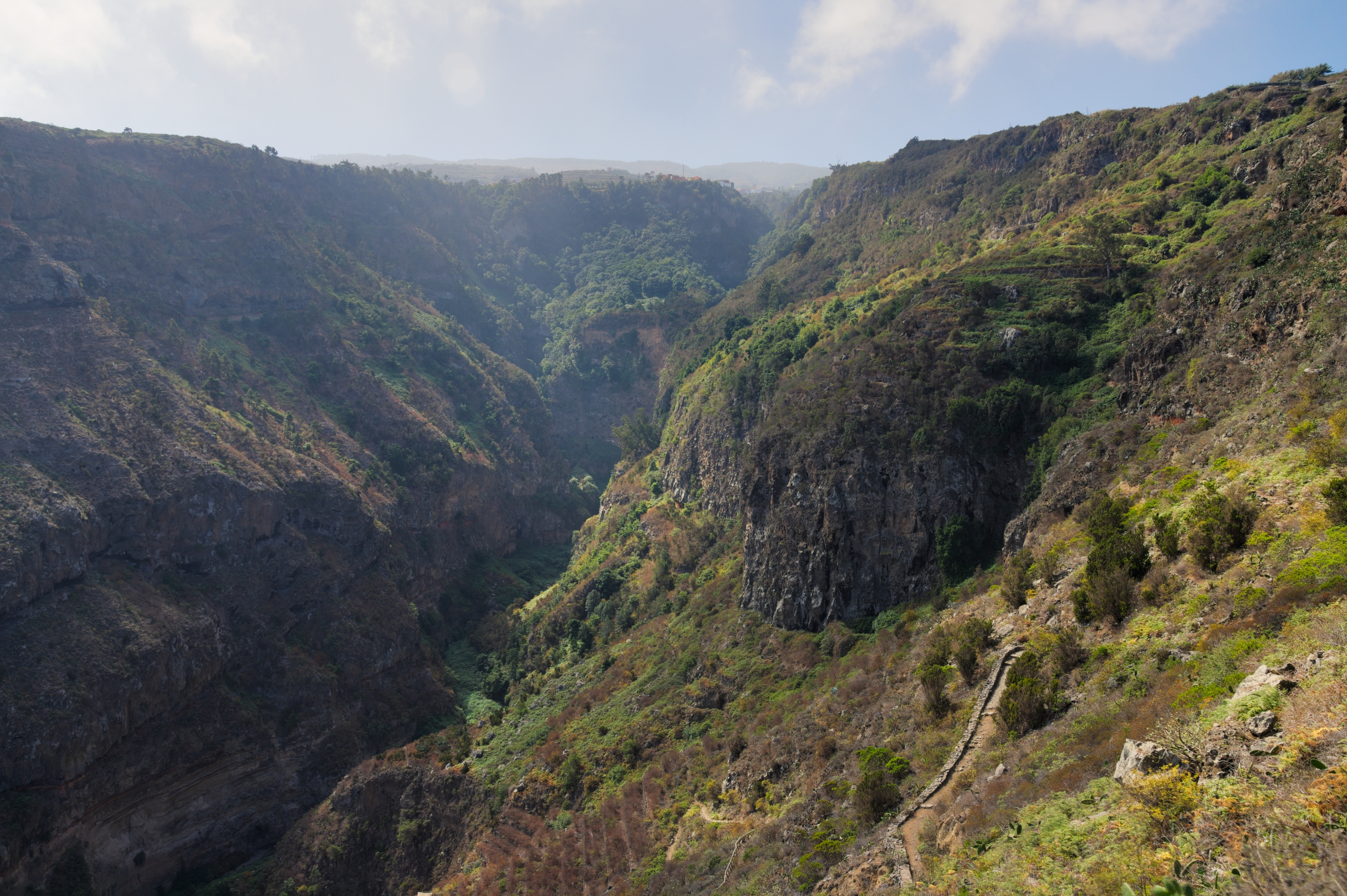 Barranco de Ruíz, límite de San Juan de la Rambla y Los Realejos. Espacio Natural Protegido con la categoría de Sitio de Interés Científico.